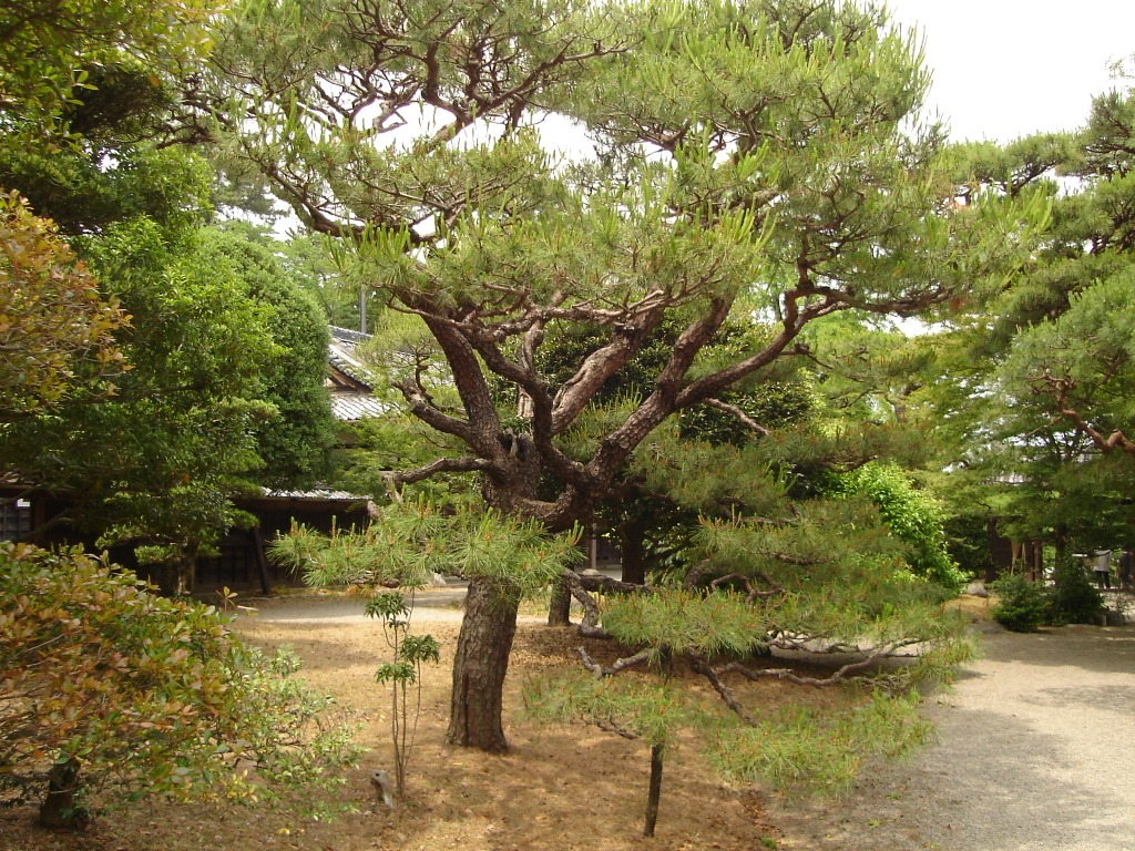 Jardim das ruínas do Castelo de Matsusaka.